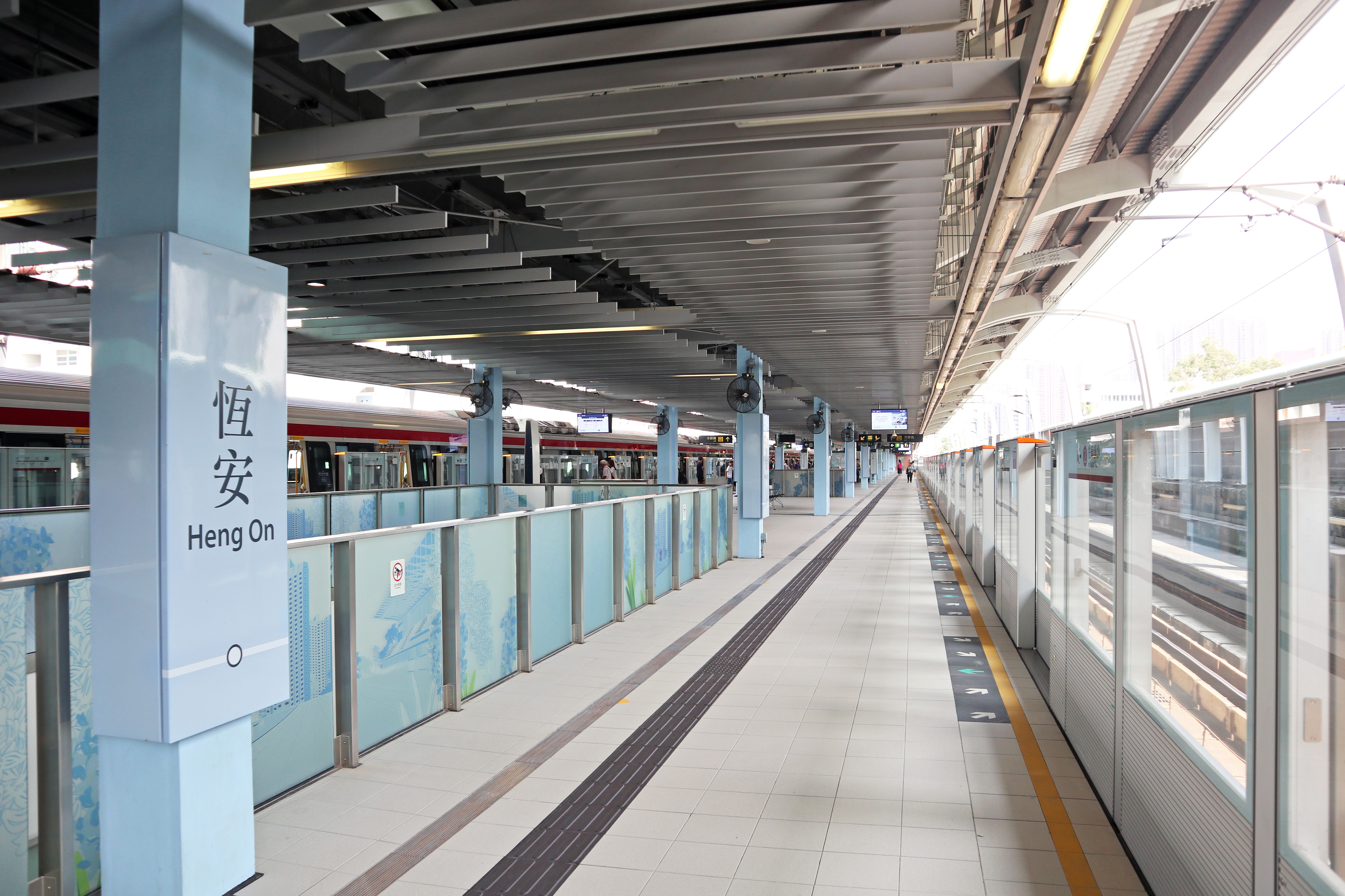 港鐵恆安站月台